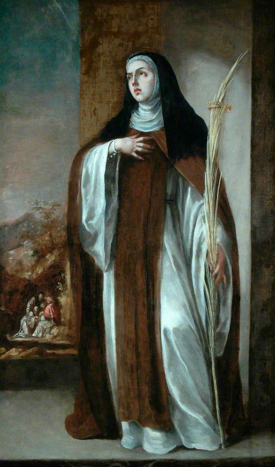 Santa Eustoquio